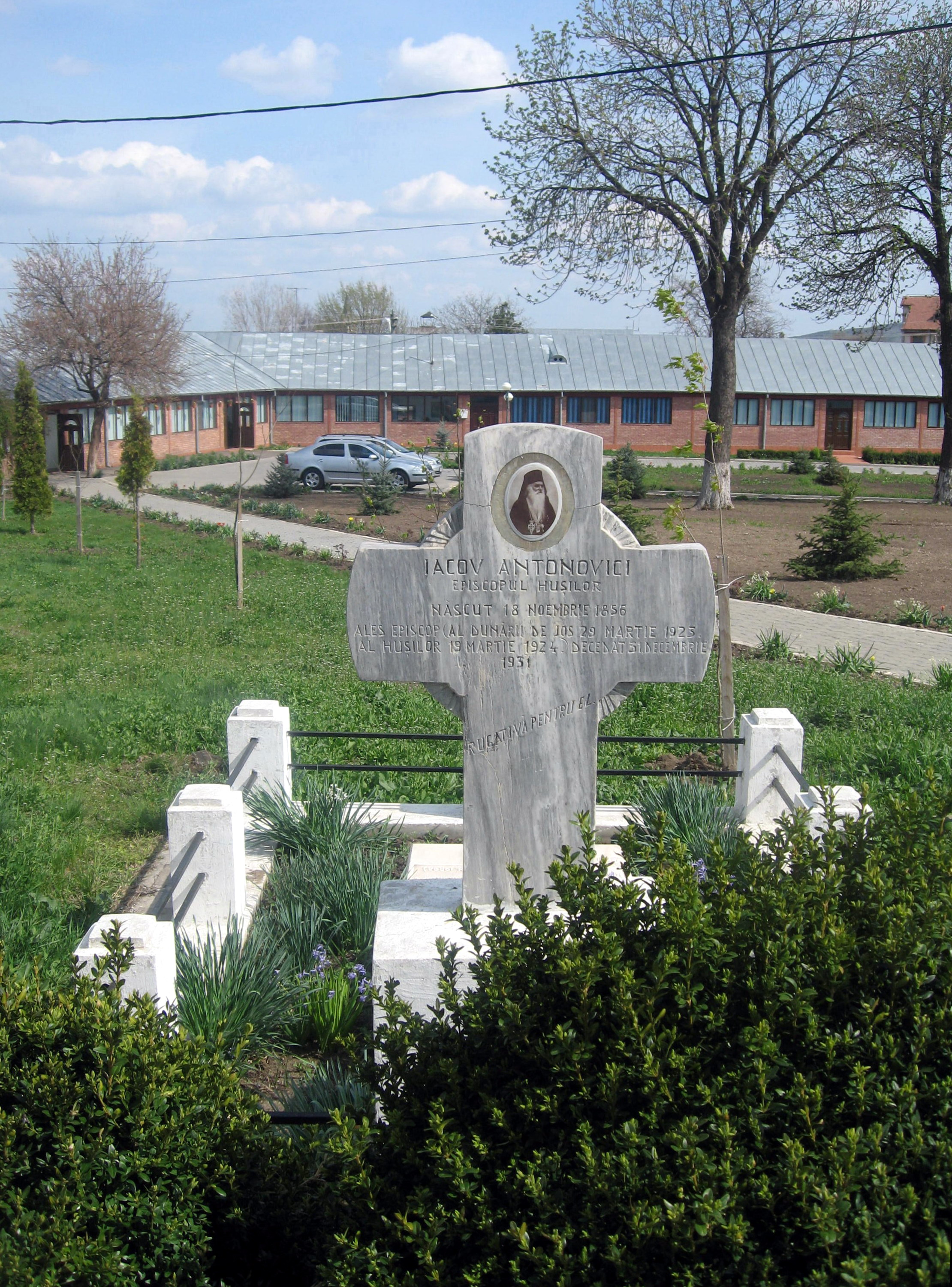 Catedrala episcopală din Huși - mormântul episcopului Iacov Antonovici